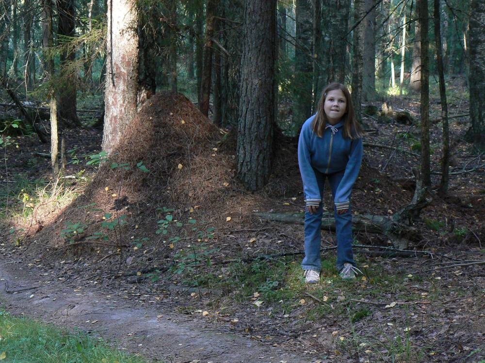 Kuklase pesa